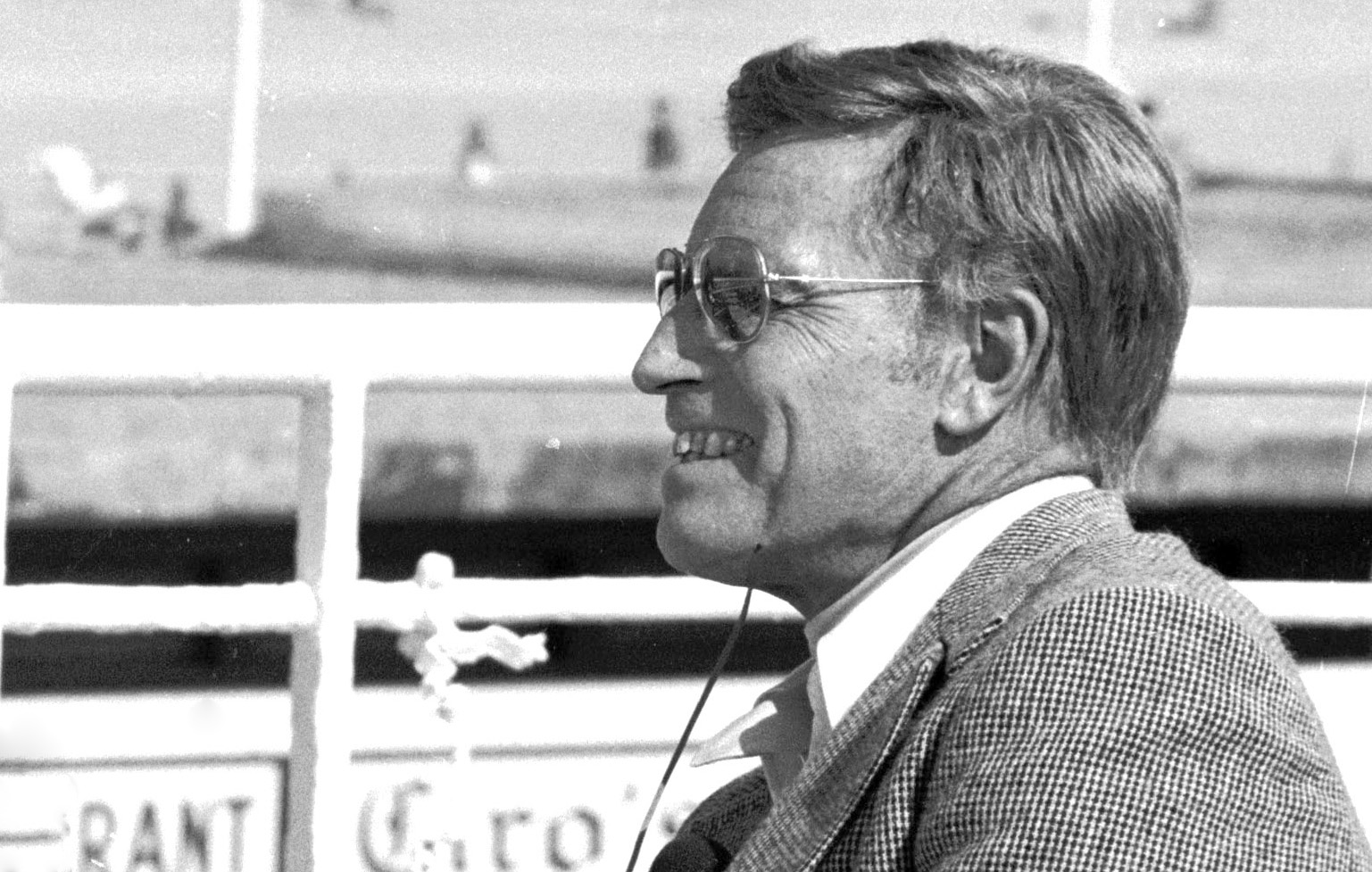 L'acteur américain Charlton Heston au Festival du cinéma américain à Deauville (Normandie, France) en septembre 1982.